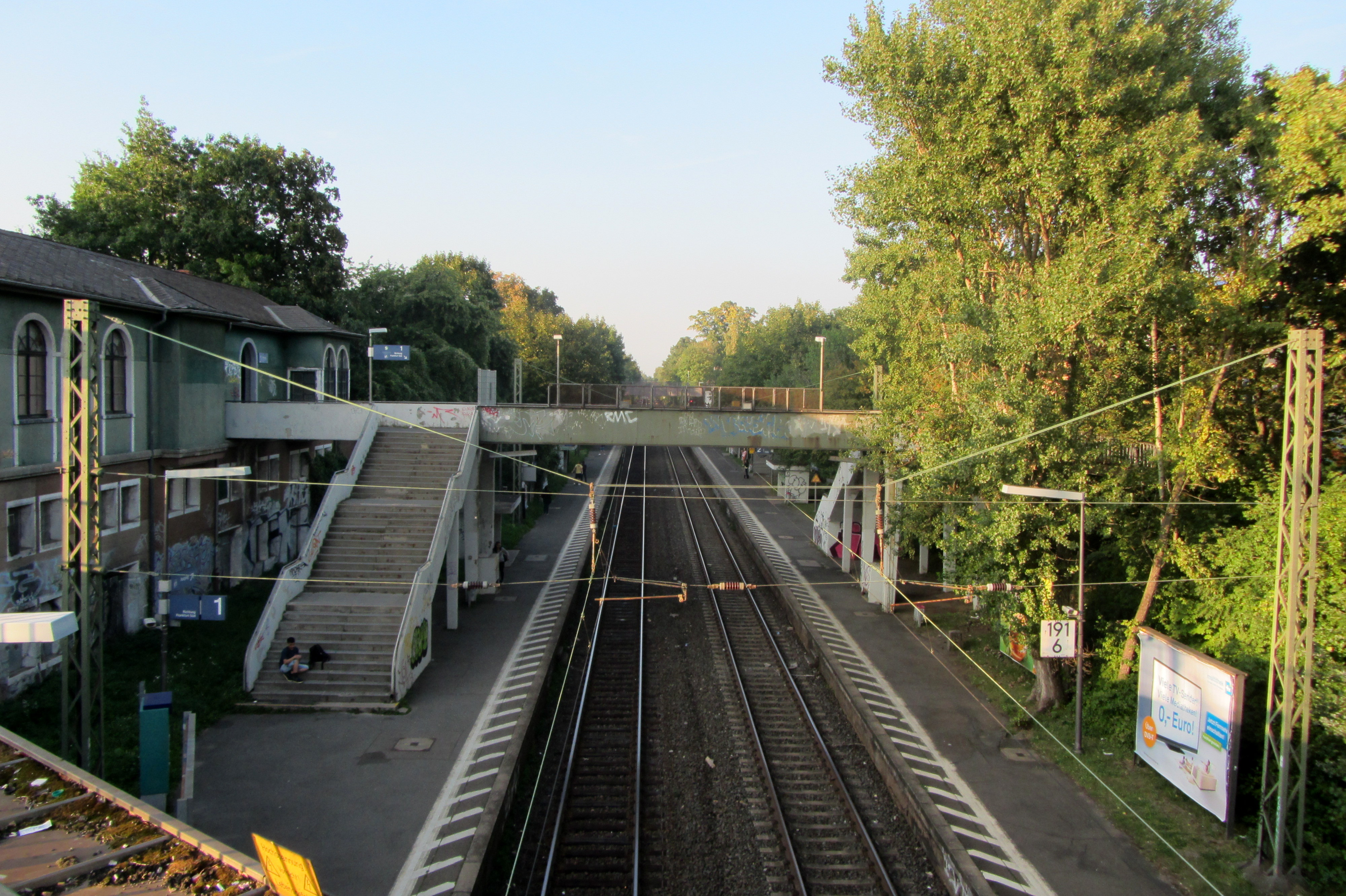 Der Bahnhof Eschersheim